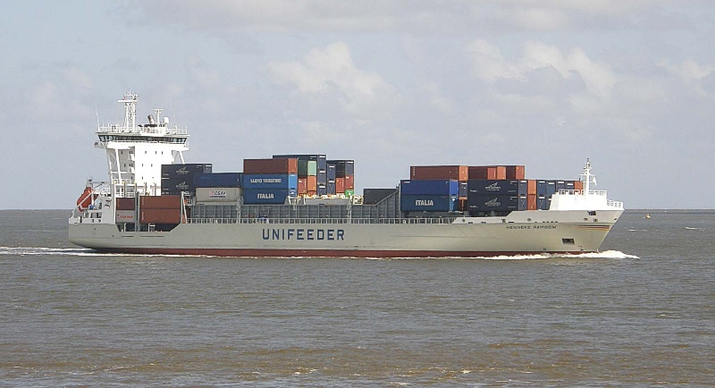 Bilder aus Cuxhaven, die HENNEKE RAMBOW IMO Number: 9354430 MMSI Number: 218044000 Callsign: DDVQ2 Length: 134 m Beam: 22 m